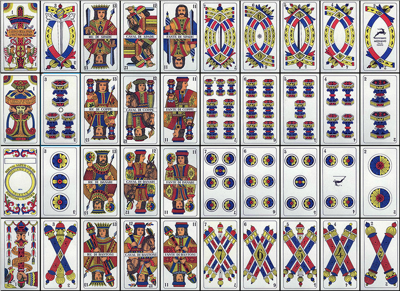 Tršćanska verzija talijanskih karata s kojima se najčešće igra skopa.